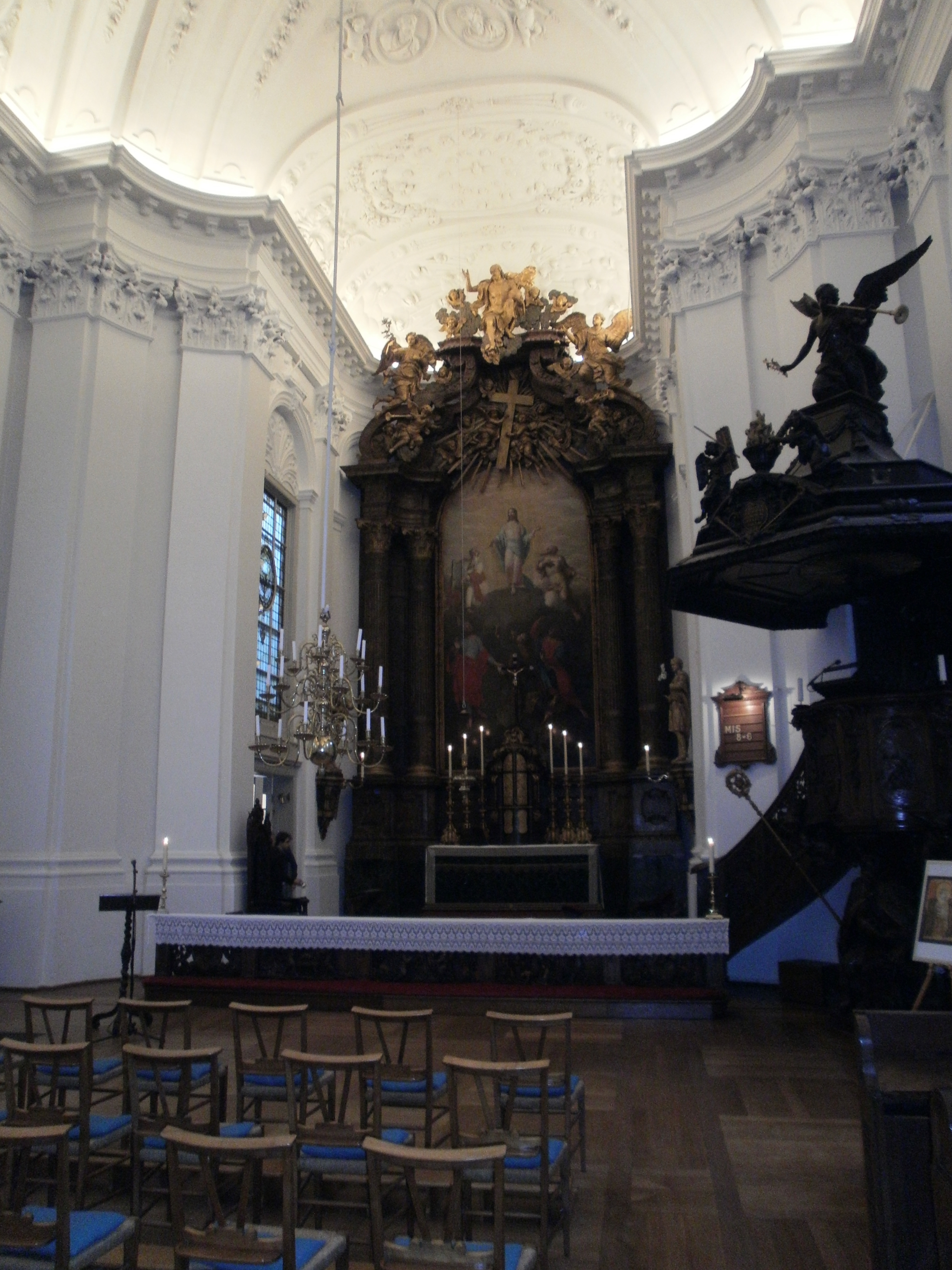 Eglise vieille-catholique St Jacques-St Augustin (la Haye -Hollande)